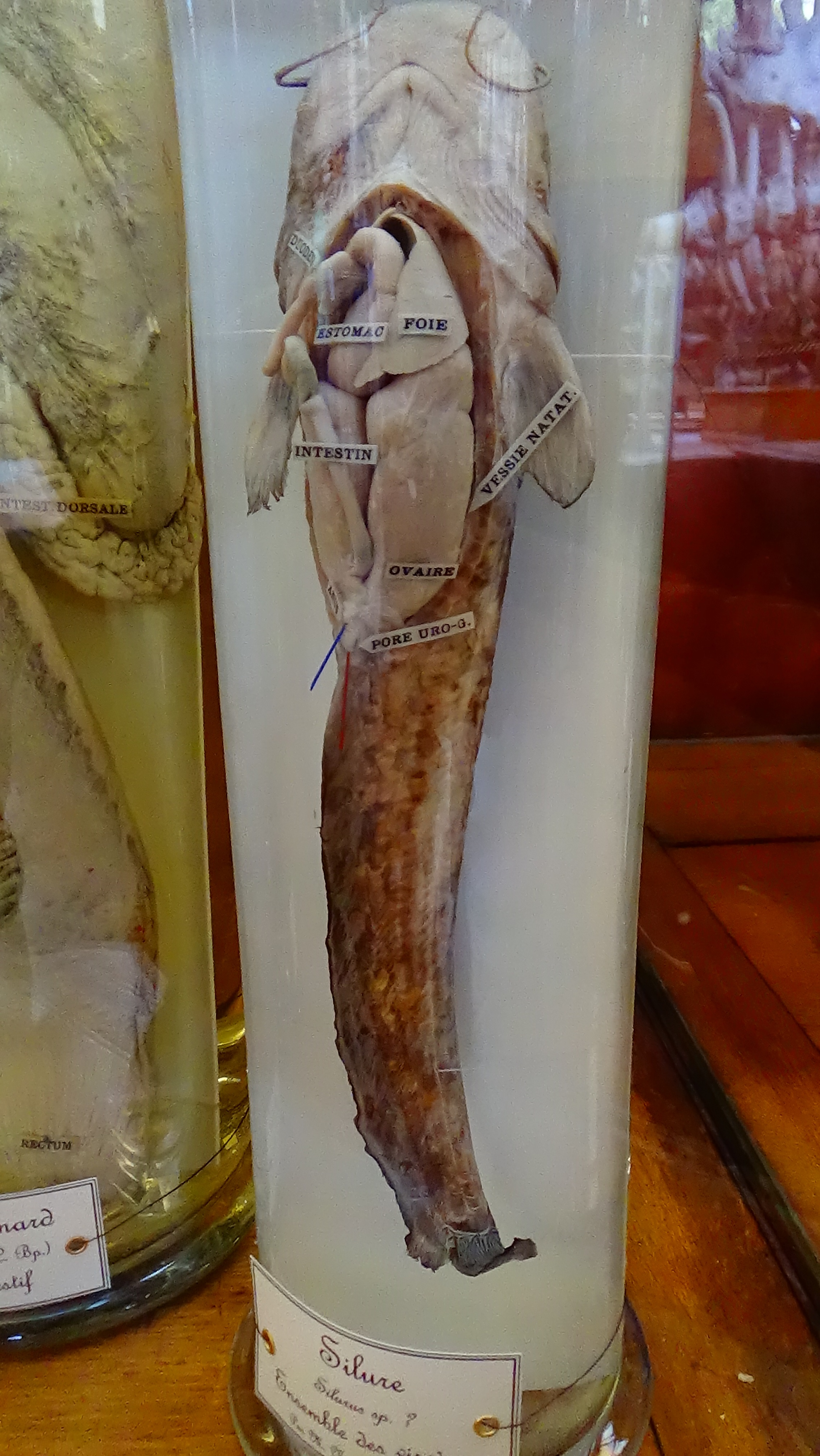 Silurus sp. - ensemble des viscères - mnhn Paris